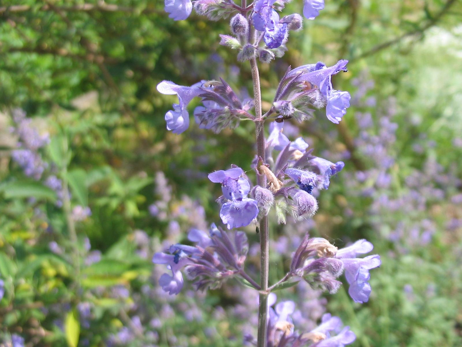 Nepeta grandiflora - Blütenstand